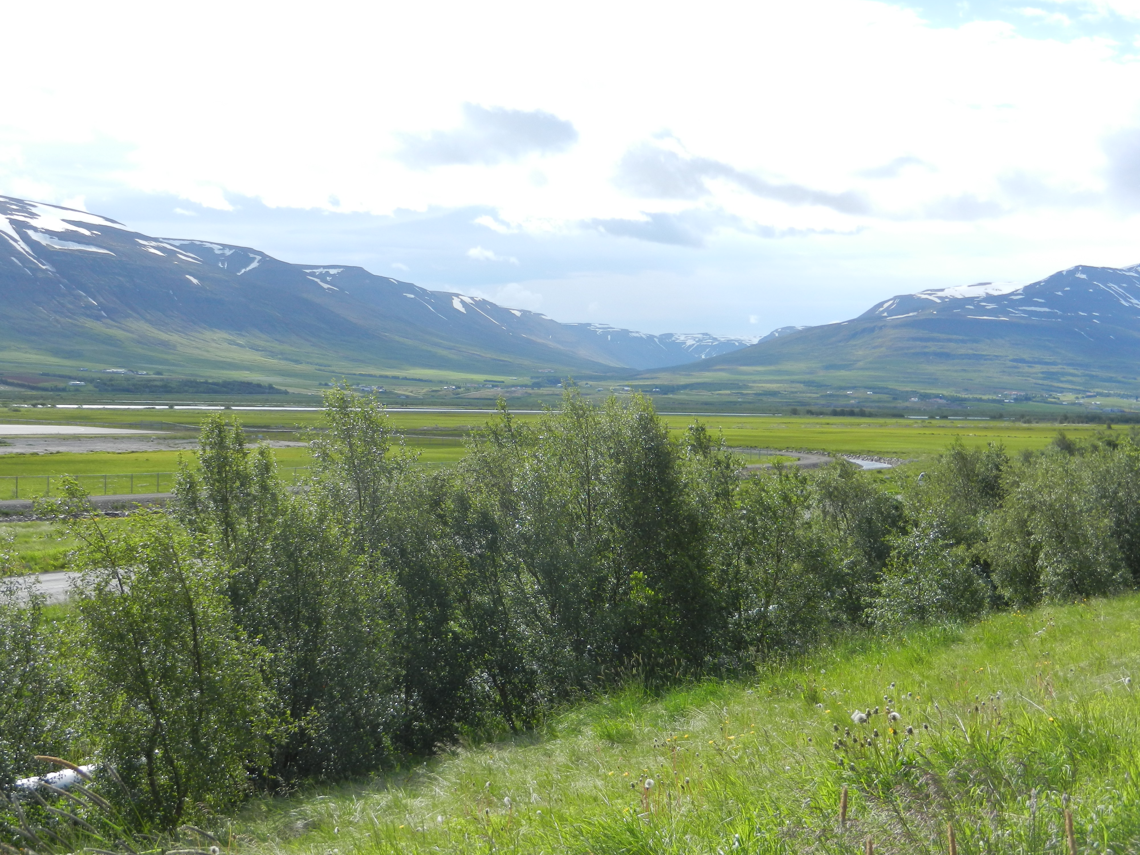 Pogled na dolino ob reki Glera, Akureyri, Islandija.